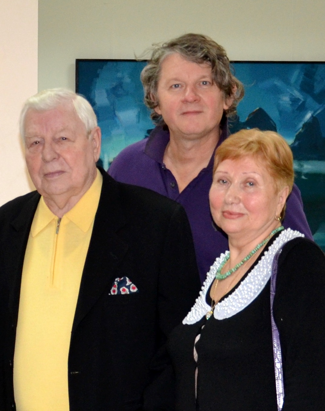 Леонид Щемелёв с женой Светланой и художник Андрей Смоляк во время открытия персональной выставки Леонида Щемелёва в Музее истории Минска, 28.12.2013